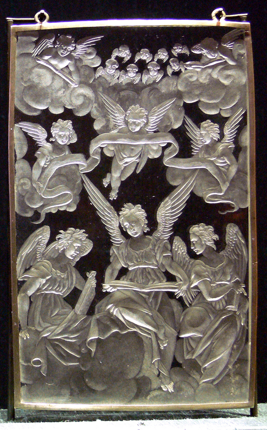 Tafel mit singenden Engeln; Caspar Lehmann zugeschrieben; München um 1586–1588 Bergkristall mit Silberfassung; aus der Silberkammer der Münchner Residenz Bayerisches Nationalmuseum, München, Inv. Nr. R 2166